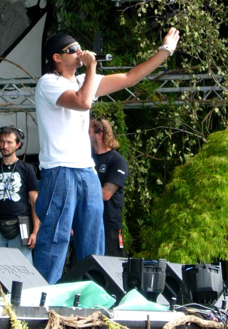 Sean Paul at MTV Day Bologna